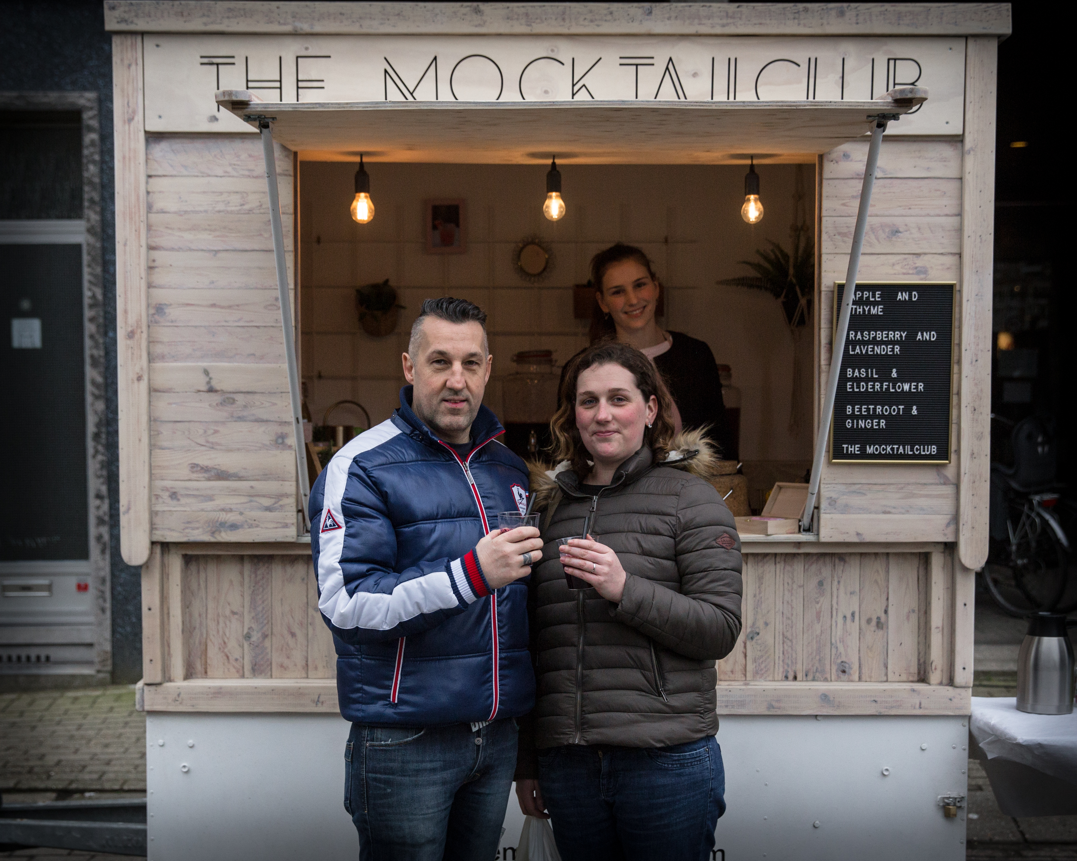 Twee inwoners van Dendermonde drinken een mocktail naar aanleiding van Tournée Minérale in 2018